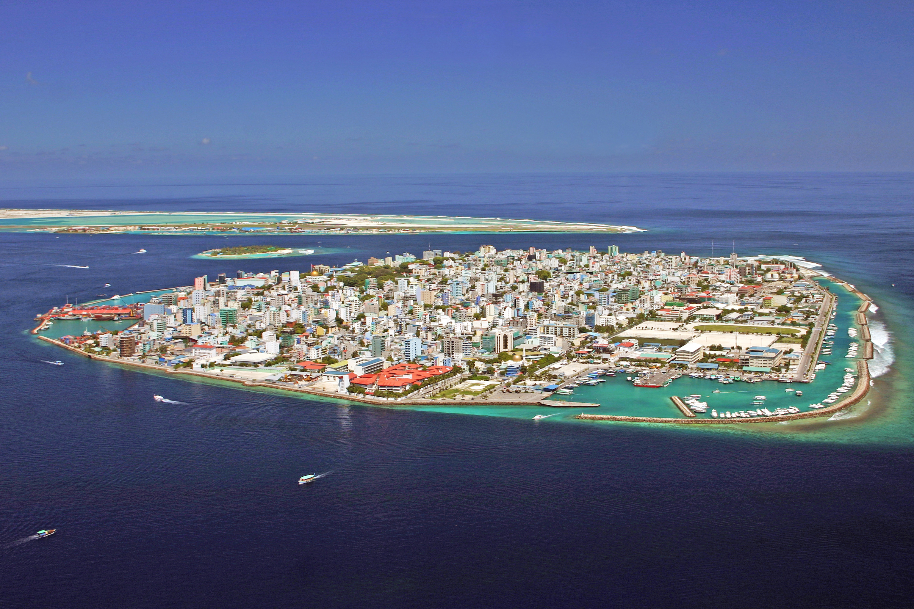 Malé, capital of Maldives